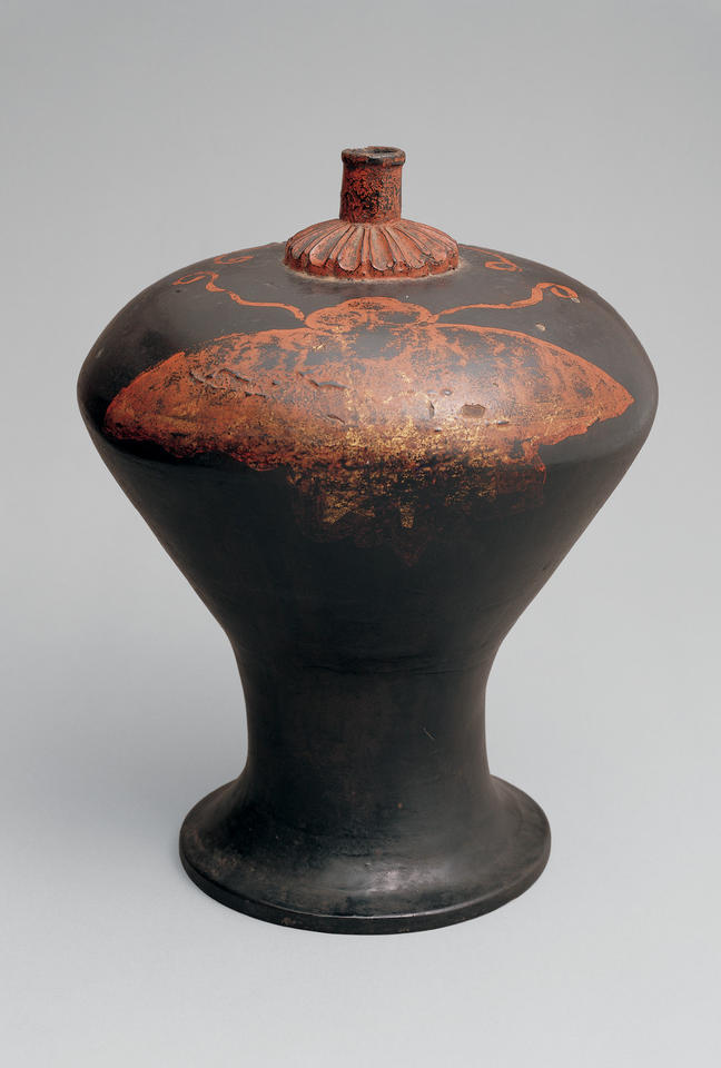 Japan; Sake vessel; Lacquer